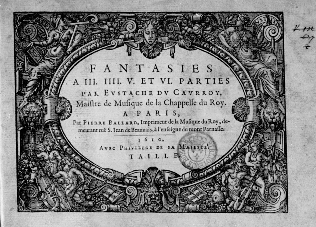 Fantasies à III IIII V d'Eustache Du Caurroy, imprimées par Pierre Ballard, 1610 (fonds BnF)